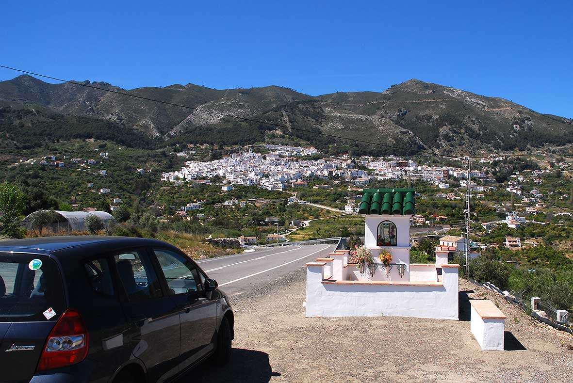 View to Casarabonela